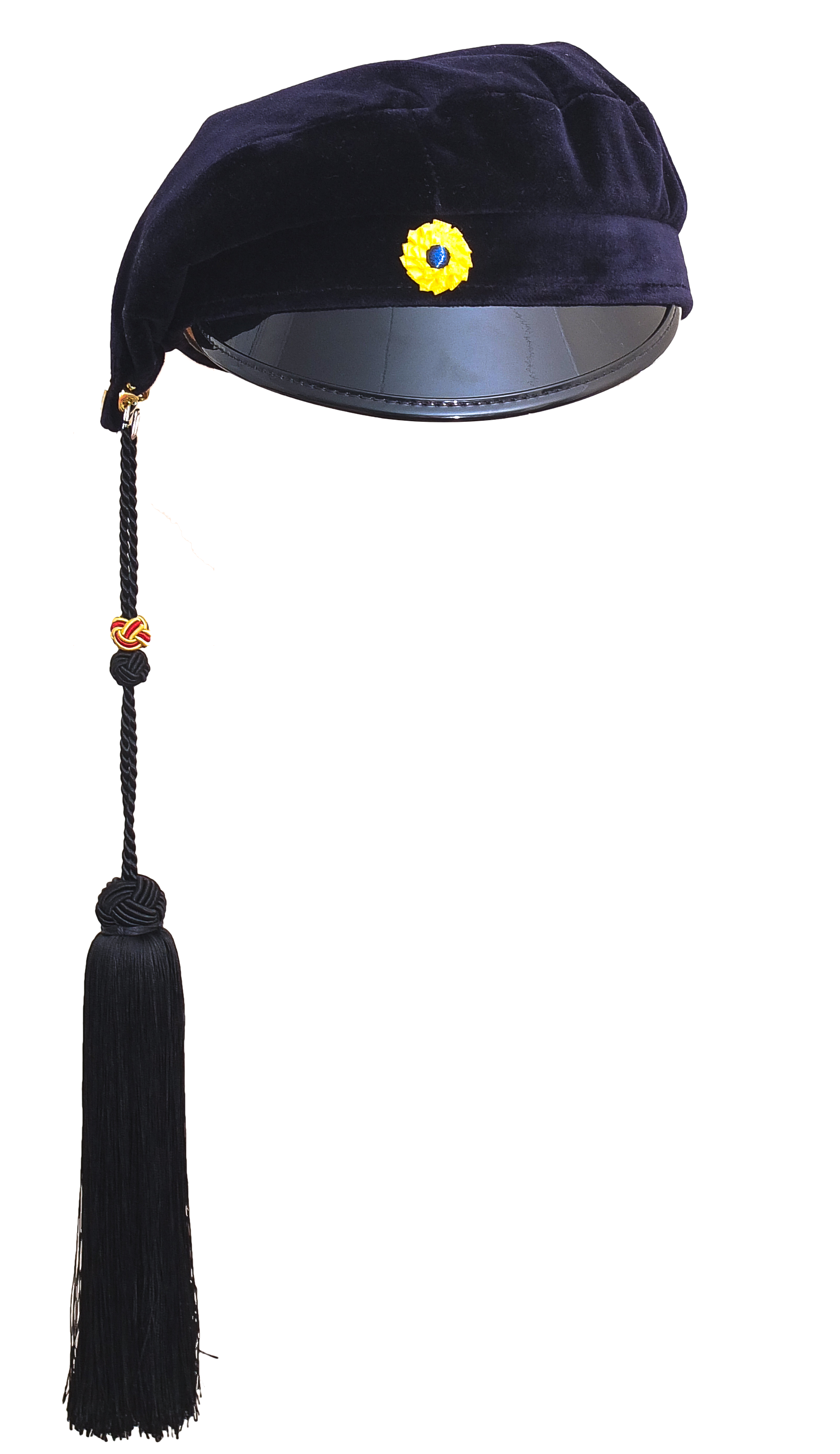 Studenter under tekniska fakulteten (JTH) på Högskolan i Jönköping bär denna typ av teknologmössa.